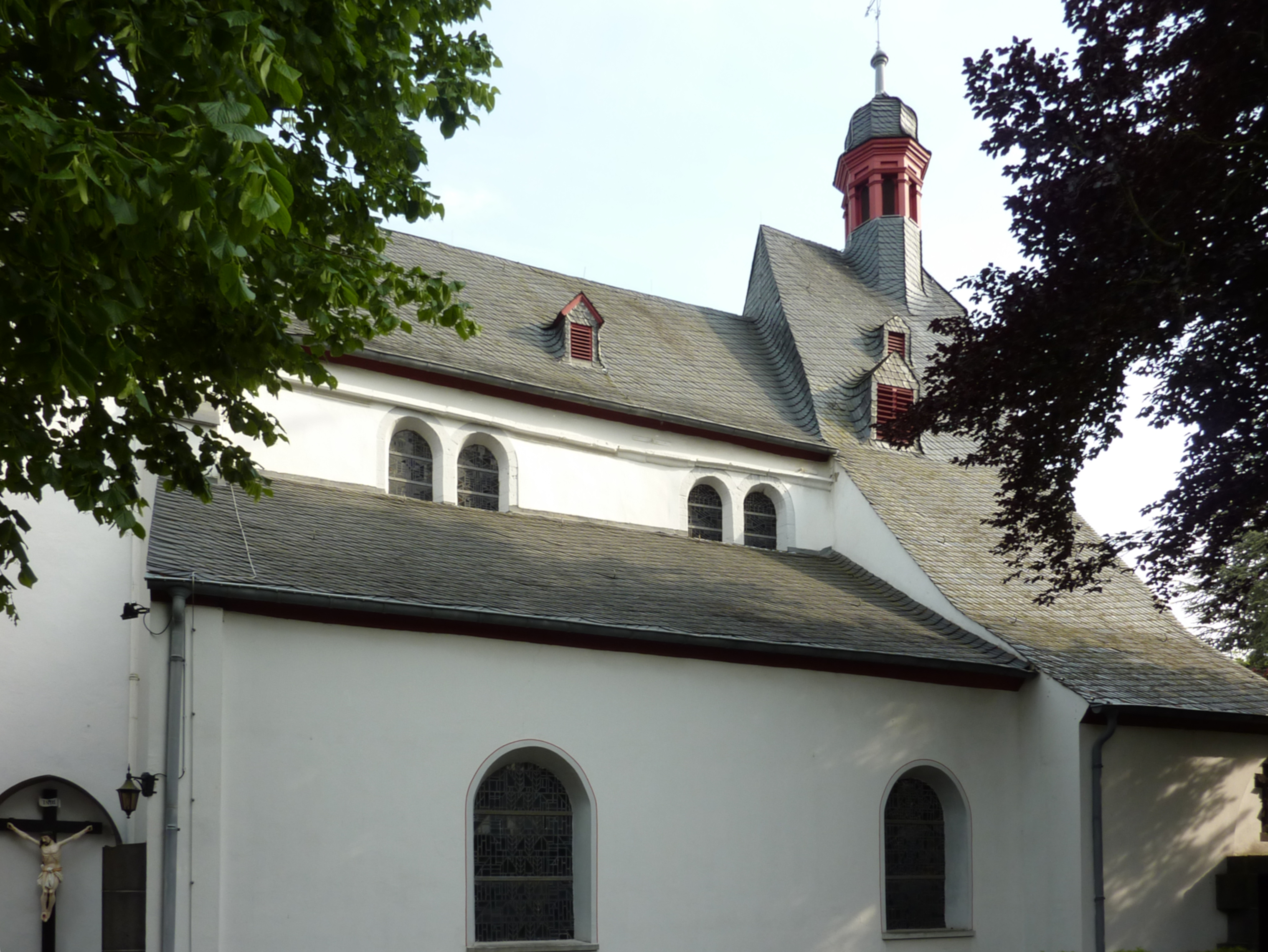 katholische Pfarrkirche St. Silvester in Hausen, einem Stadtteil von Mayen, Außenansicht